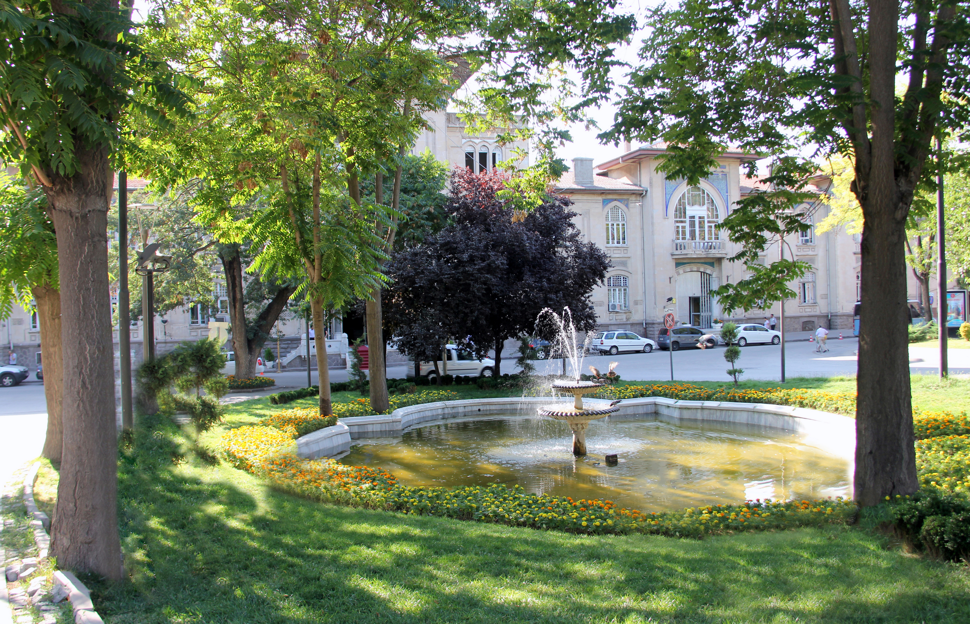 hükümet meydanı ve ana bina